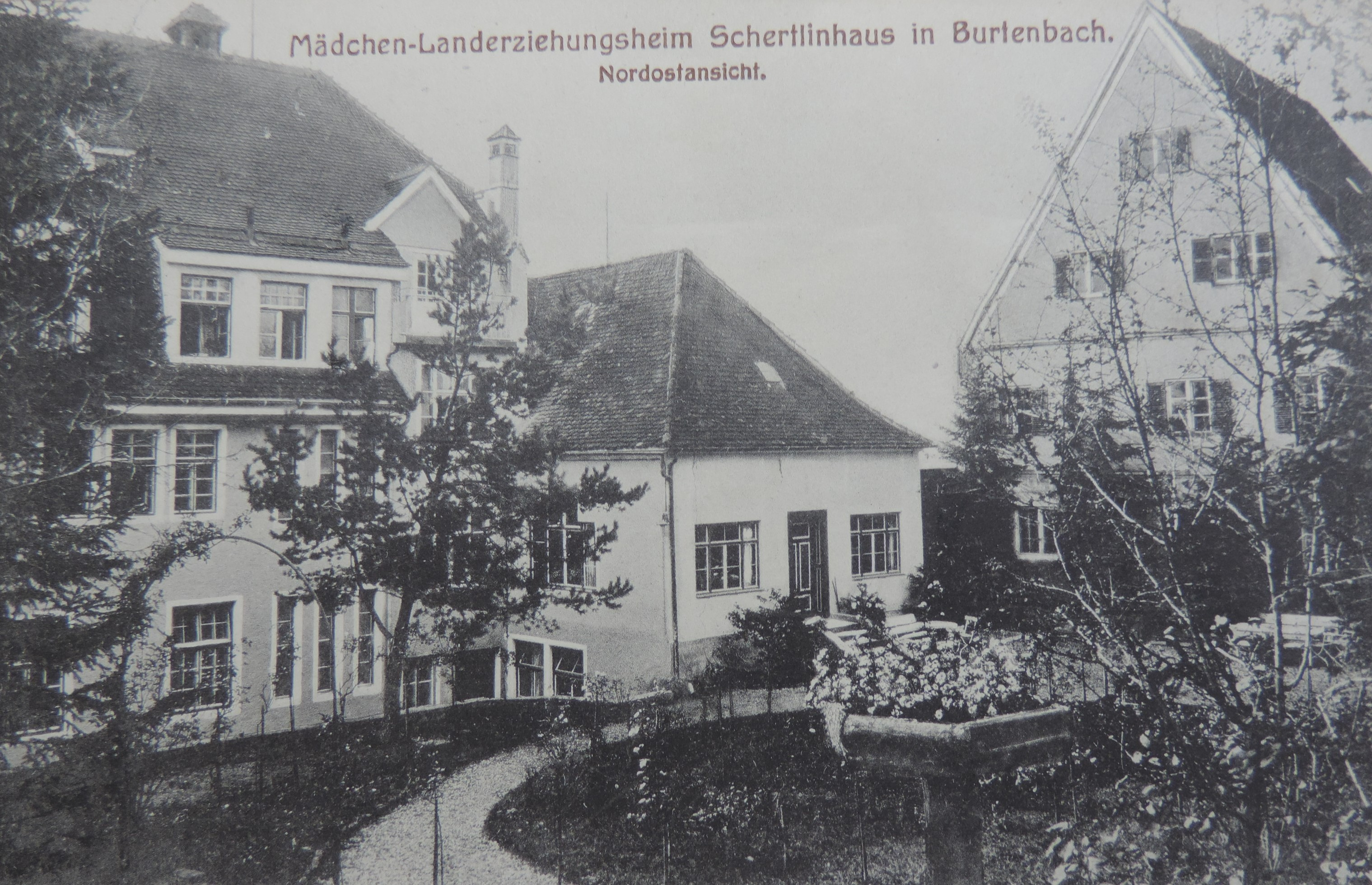 Mädchen-Landerziehungsbeim Burtenbach